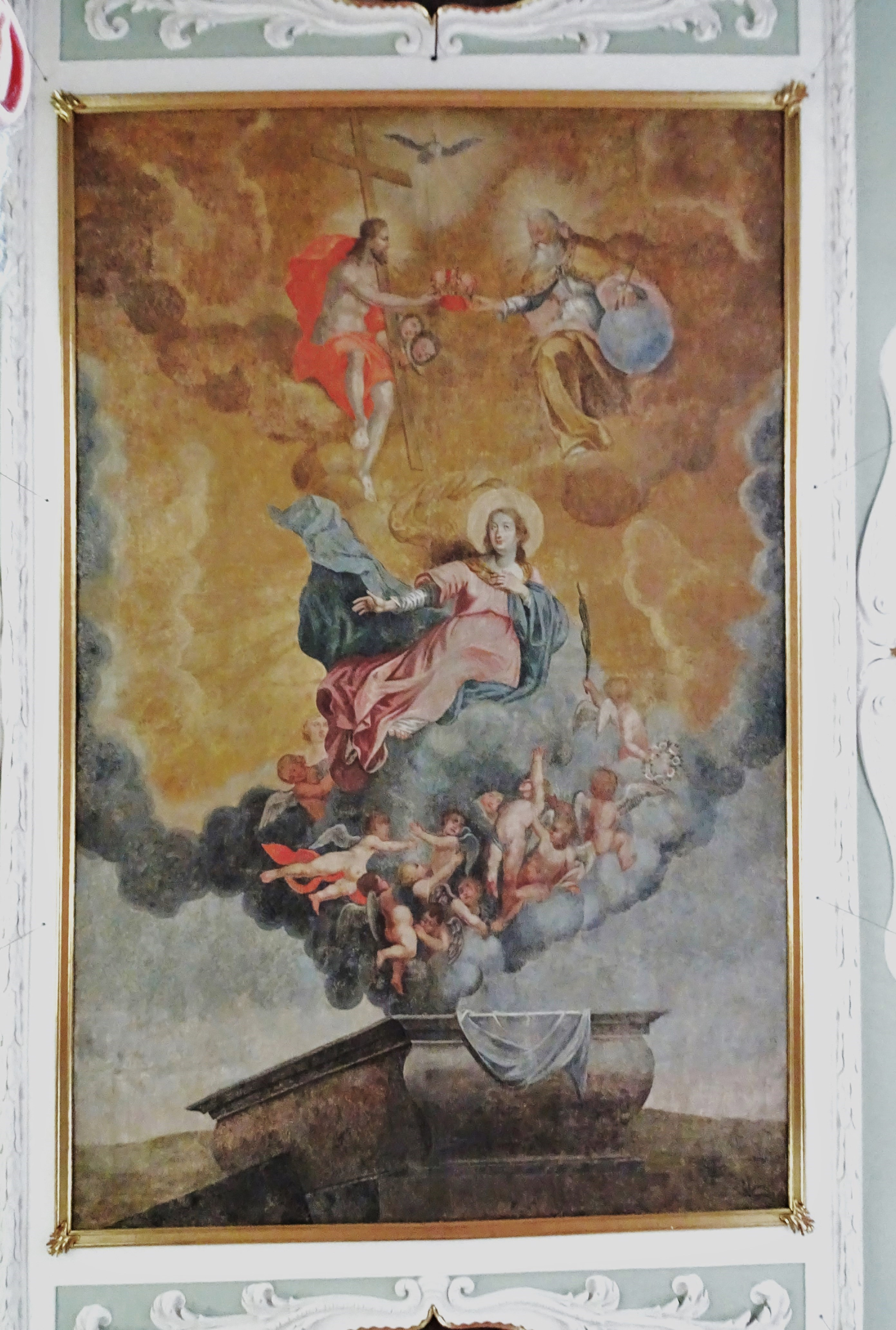 Kath. Pfarrkirche St. Maximilian Treffen, Deckengemälde: Aufnahme Mariens in den Himmel